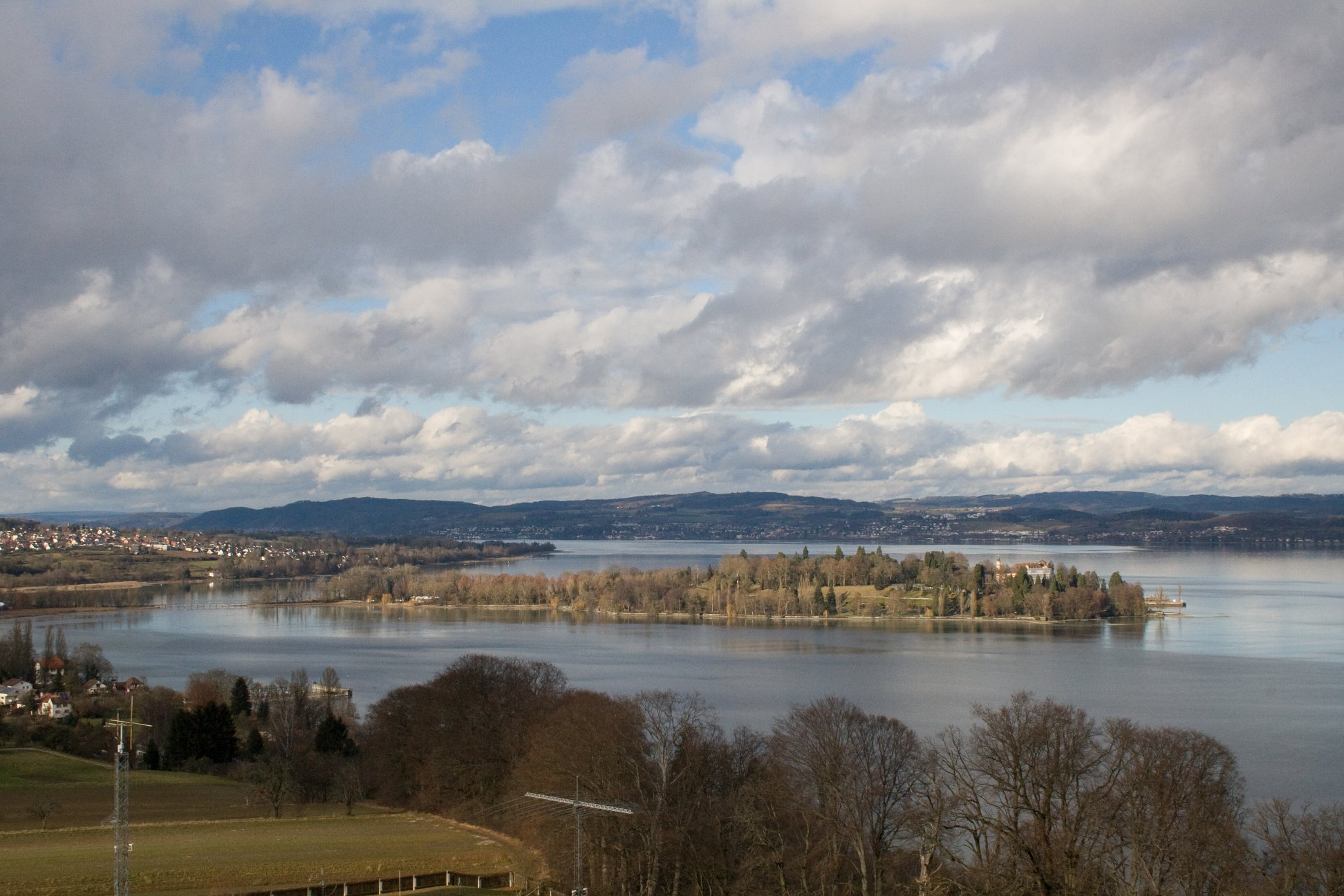 Aufnahme der Insel Mainau im Bodensee im Winter. Vorne links sind ein paar Häuser des Ortes "Egg" zu sehen, hinten links im Bild ist der Ort "Litzelstetten" zu sehen.